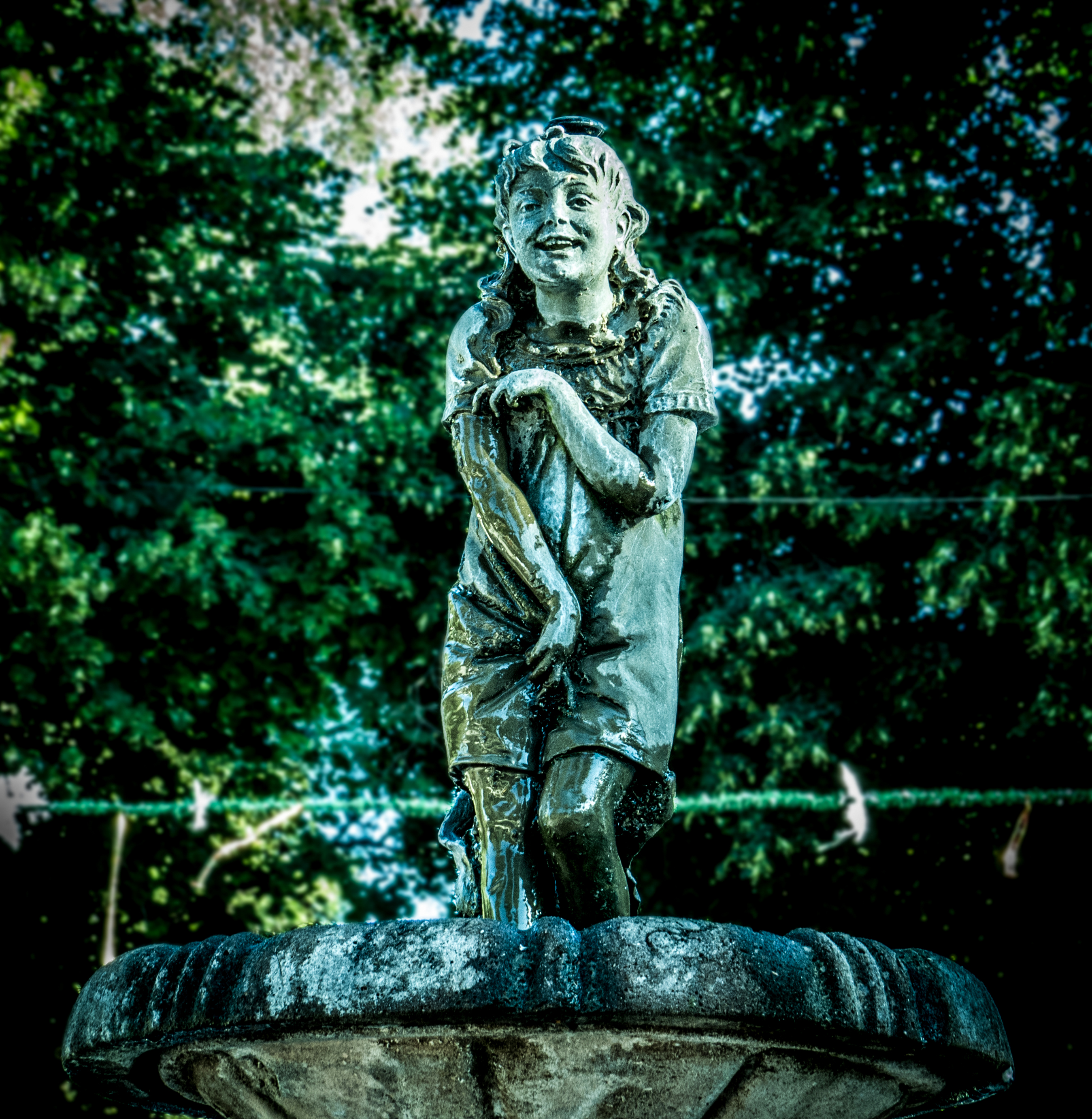 Estatua central de la fuente de agua, en la Plaza de Parral